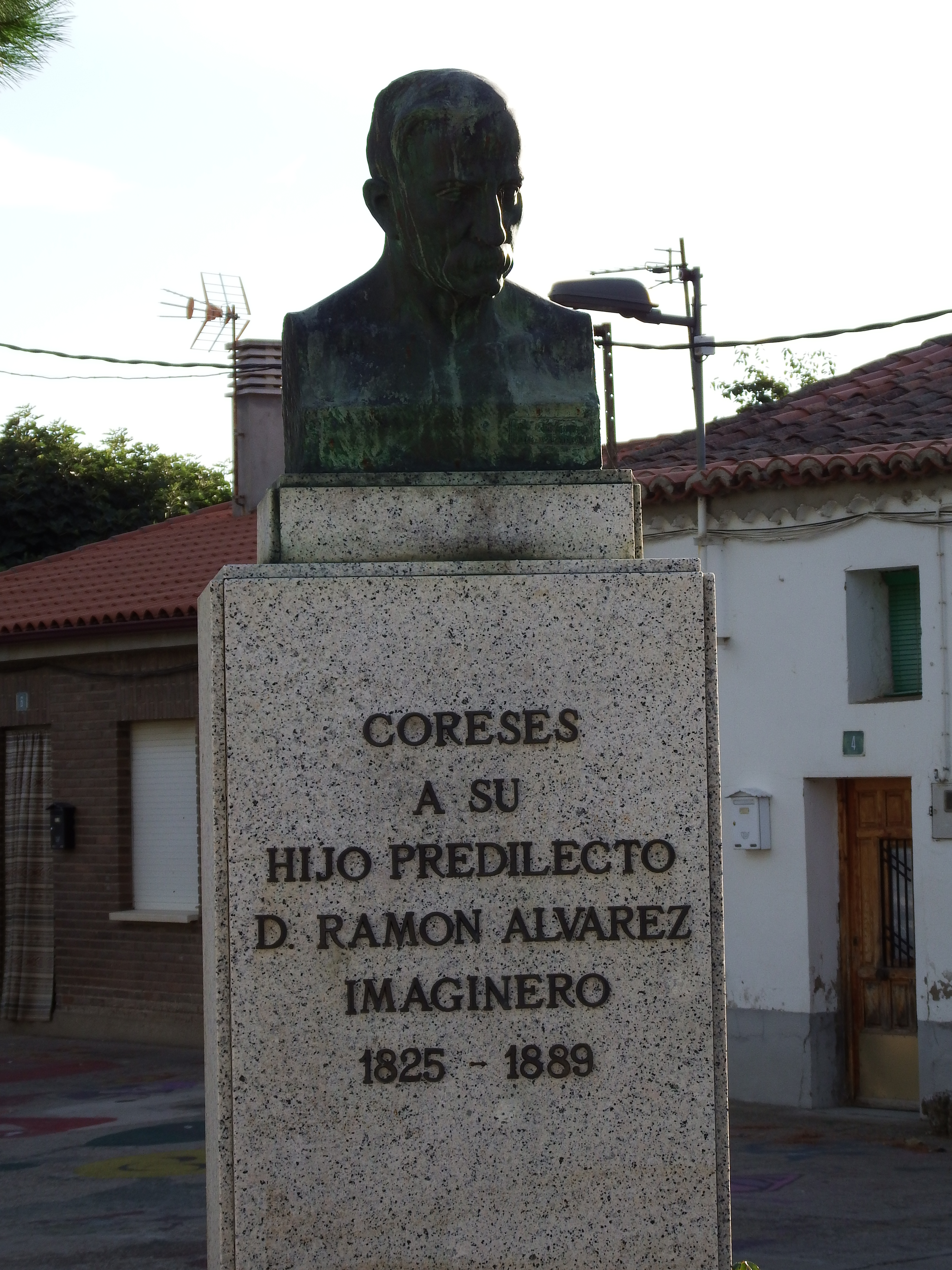 Coreses